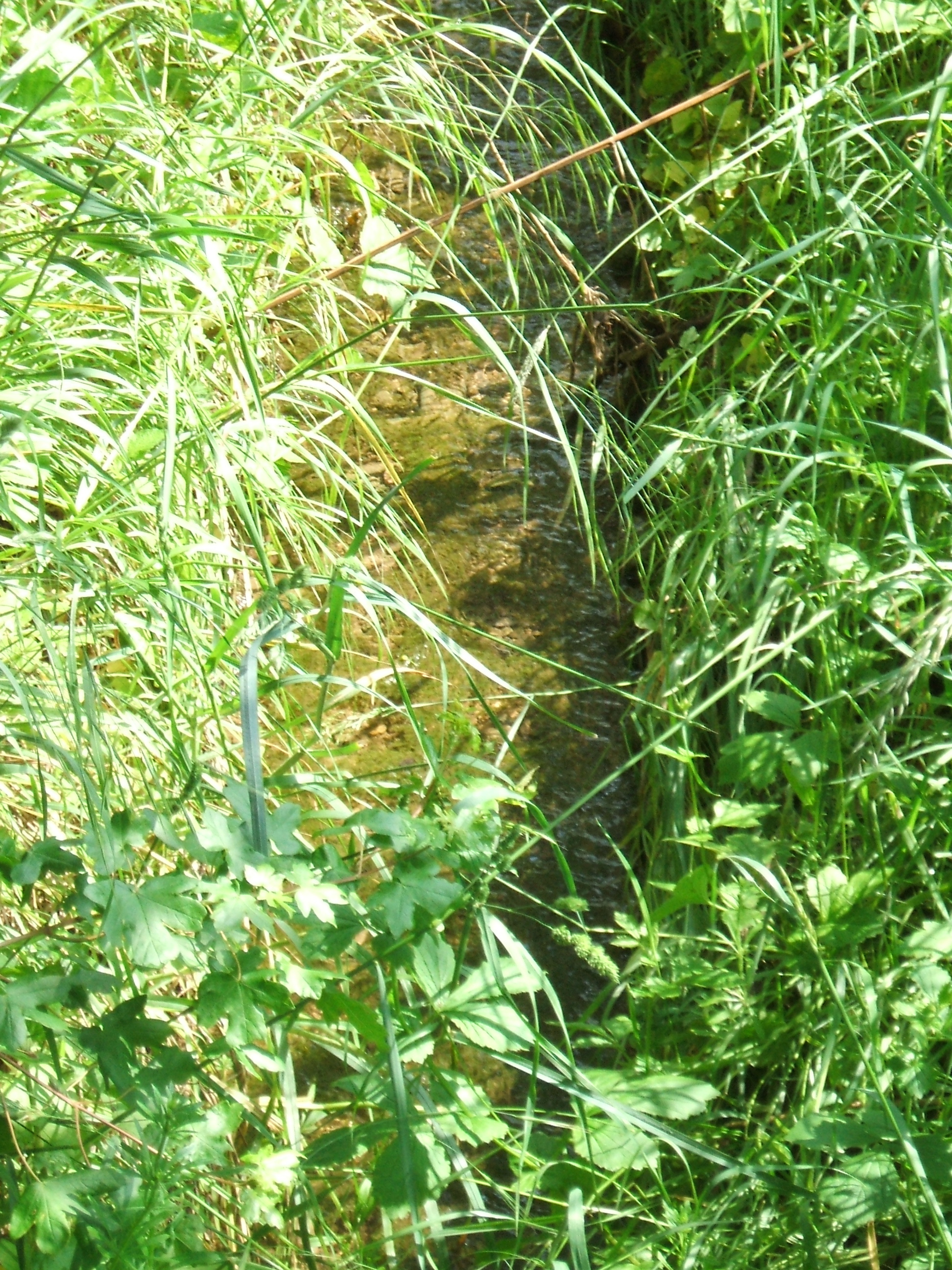 Sohlenbefestigung des mit Wasser gefüllten Hainbachs unterhalb der B 275